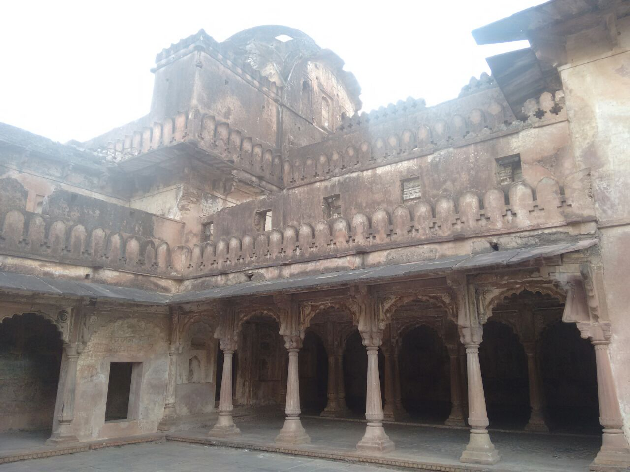 राहतगढ़ किला